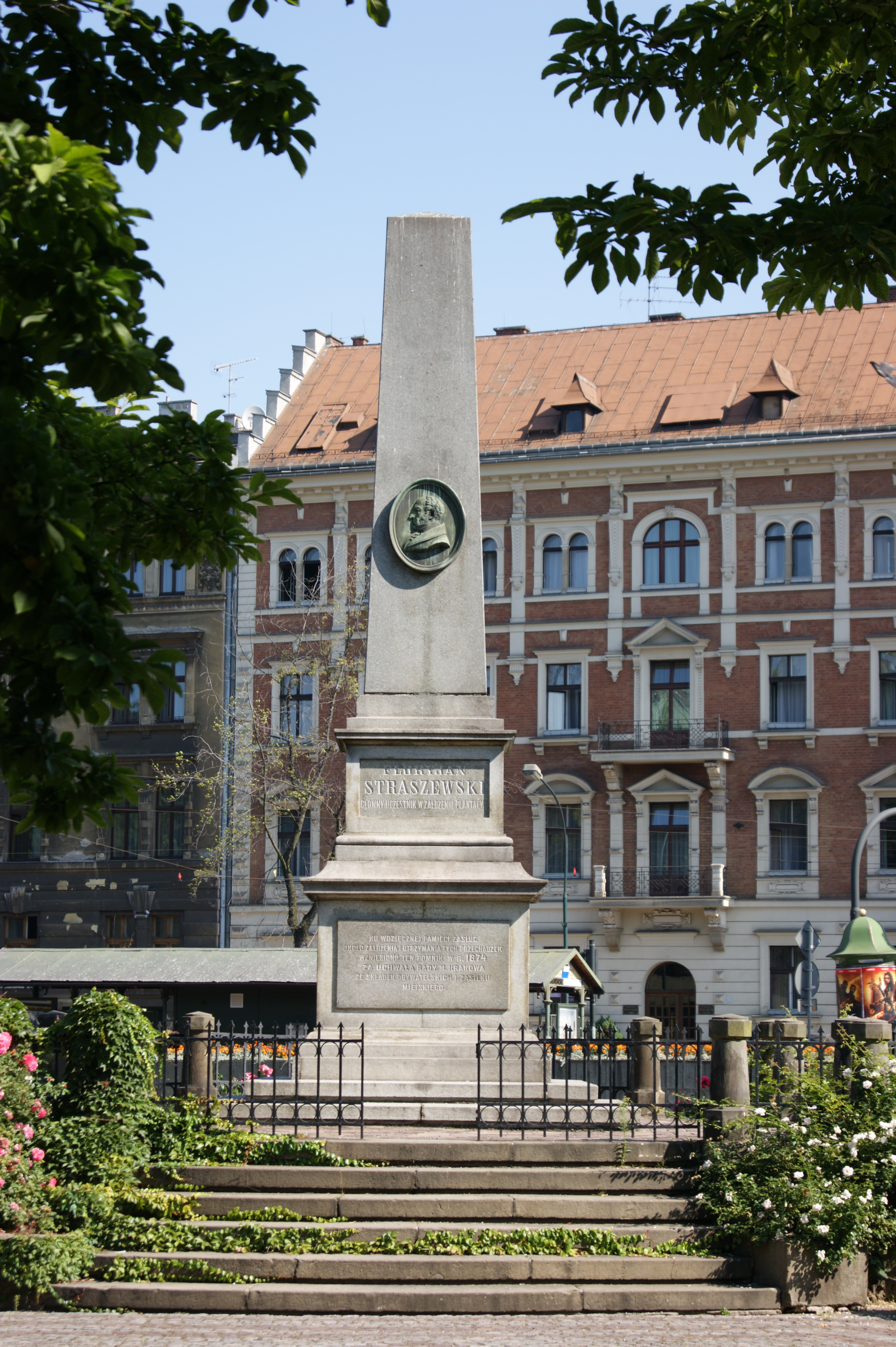 Przy skrzyżowaniu Basztowa/Westerpatte (2)